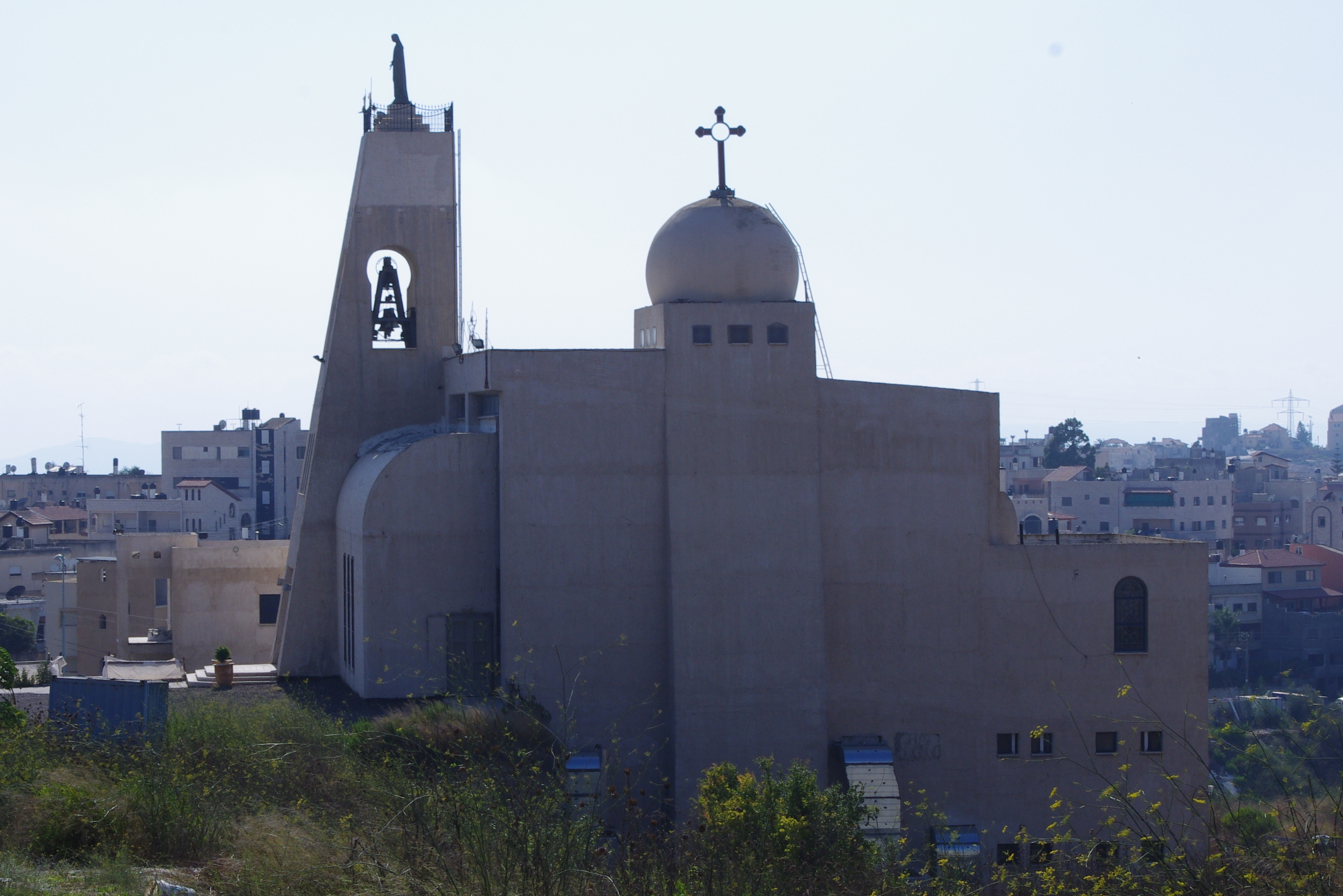 Kostol